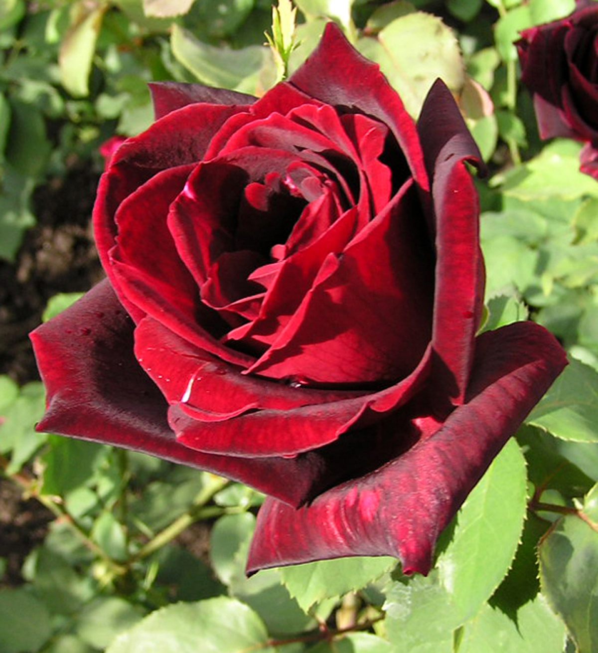 Description: Rose 'Papa Meilland' Source: Eigene Fotografie Date: 25. Juli 2005 Author: Schubbay